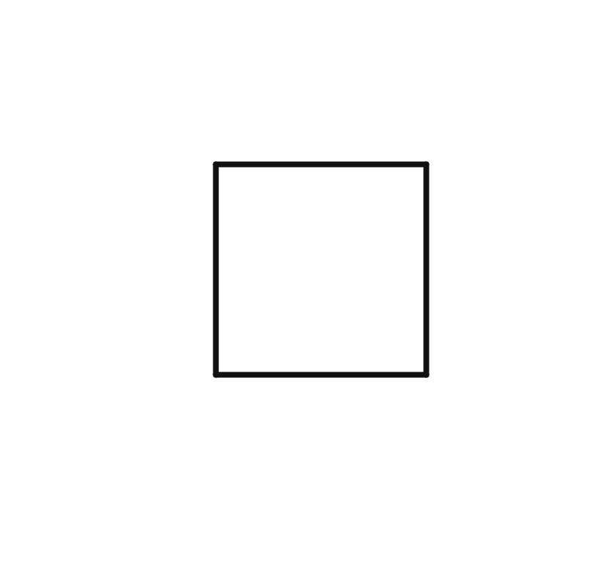 from rozeta